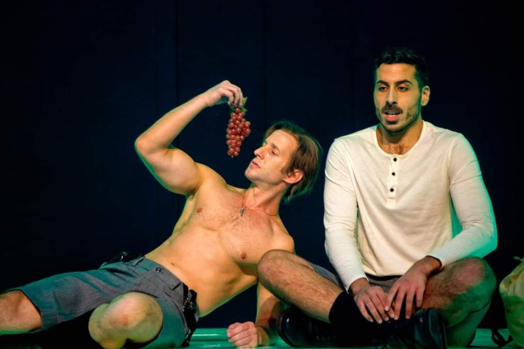 שחר רז בתפקיד הנסכן בהצגה "אביב מתעורר"